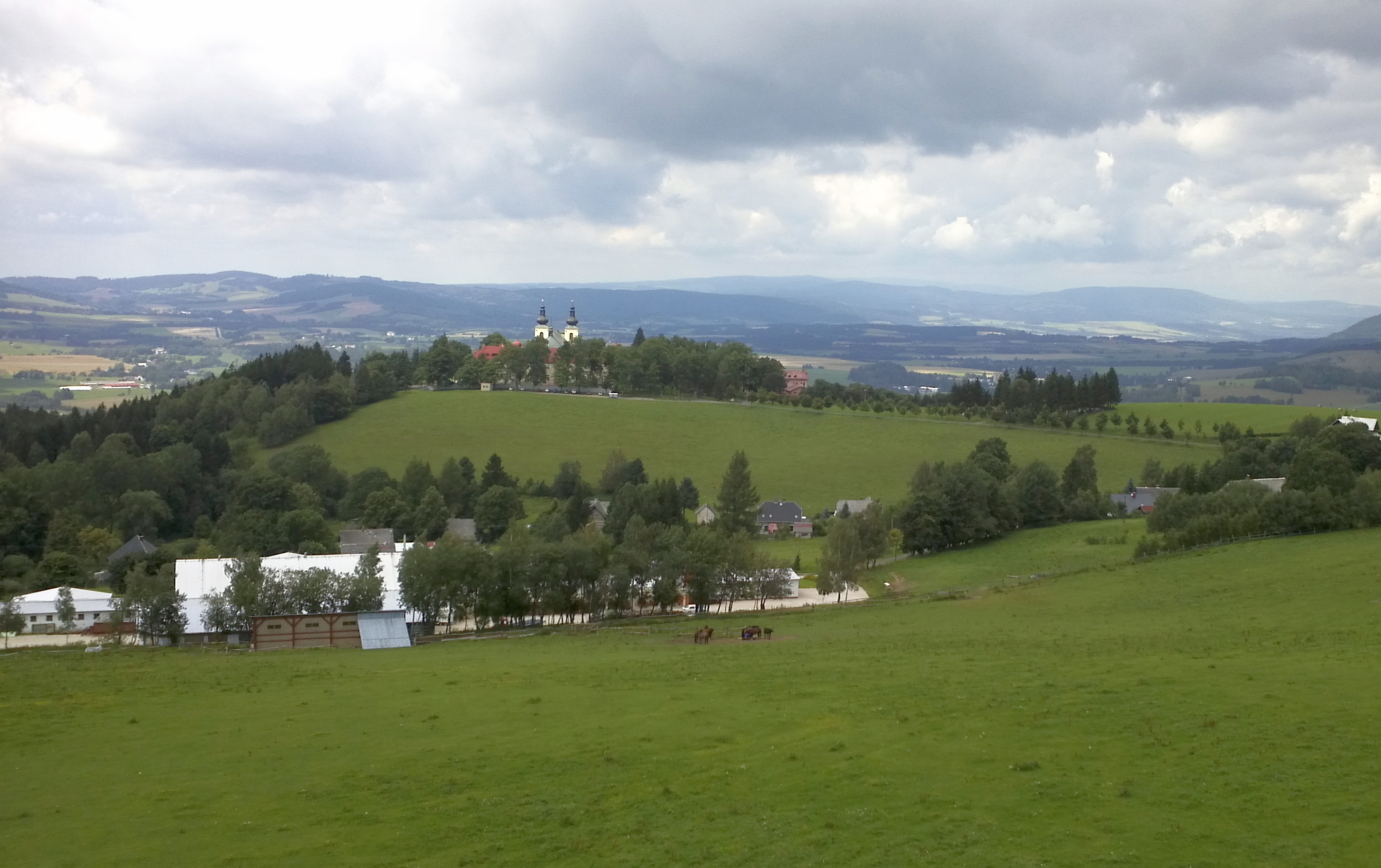 Hora Matky Boží - pohled z rozhledny na Valu